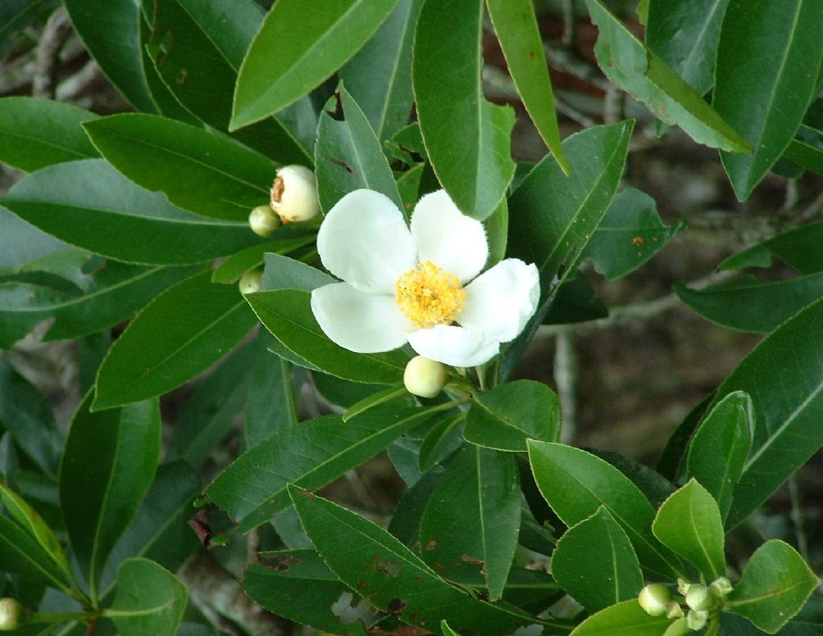 Gordonia lasianthus, Leon Co. FL USA